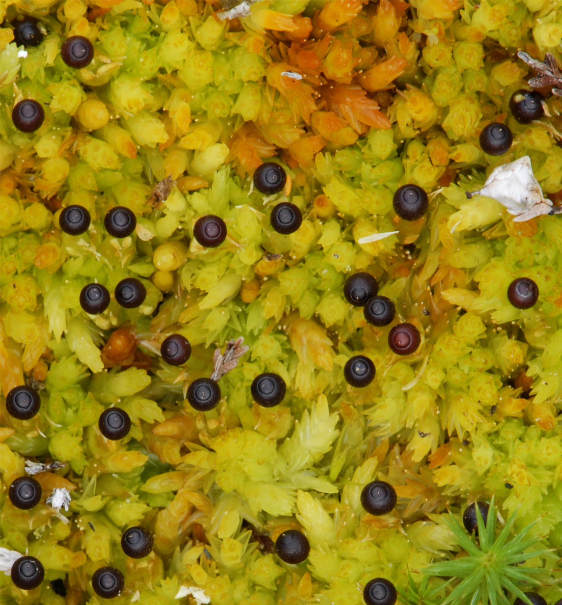 Torvmosen stivtorvmose (Sphagnum compactum).